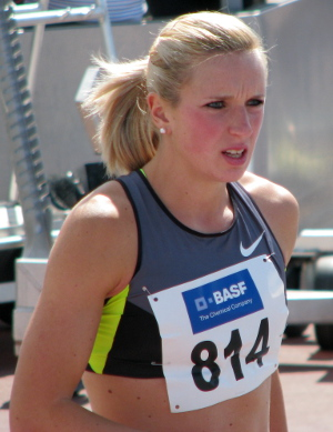 Cindy Roleder beim Olympia-Qualifikationswettkampf 2012 im Stadion der MTG Mannheim.